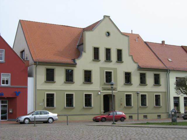 Zabytkowa kamienica w Usedomie